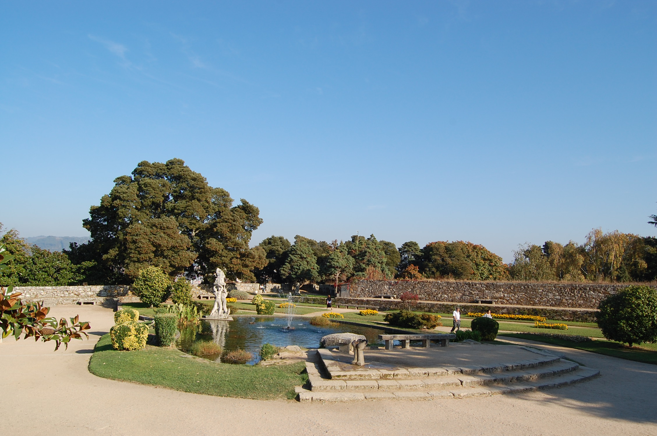 O parque do Castro em Vigo.